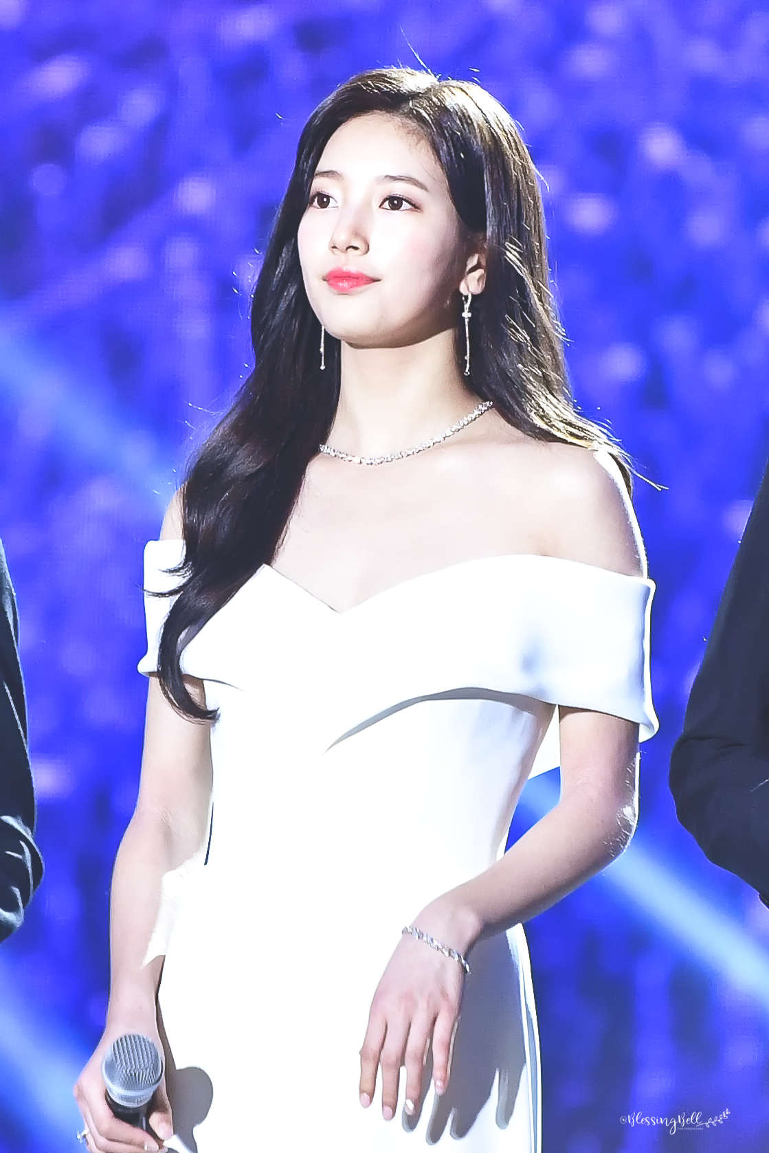 180503 54회 백상예술대상